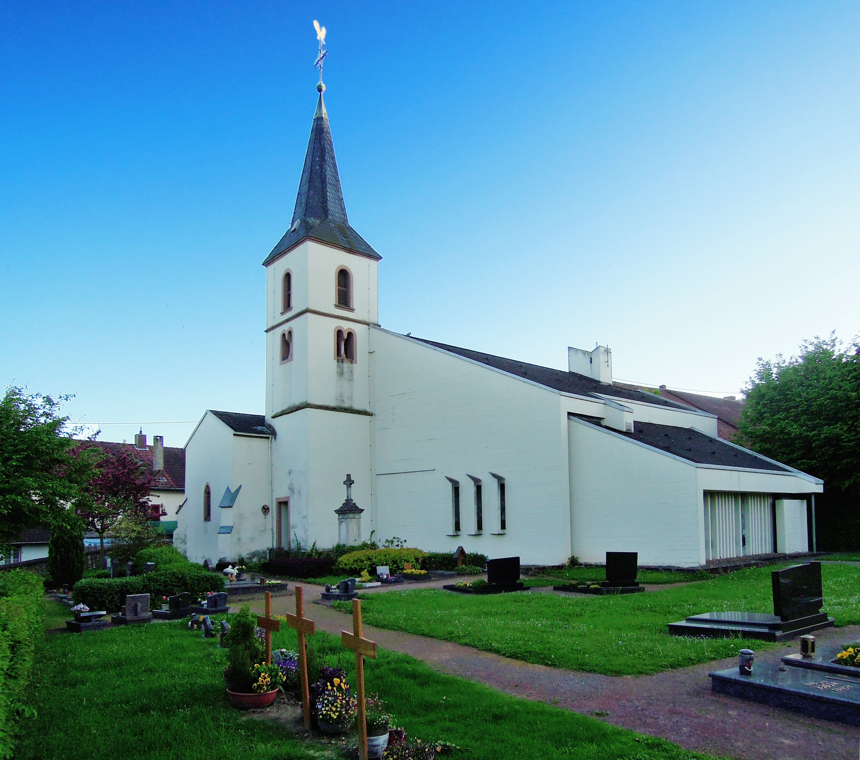 Engelstraße, kath. Filialkirche St. Quiriacus mit Ausstattung,Chor und Turm 15. Jh., Schiff 1718, Neubau Schiff 1970–72 von Hanns Schoenecker (Einzeldenkmal)